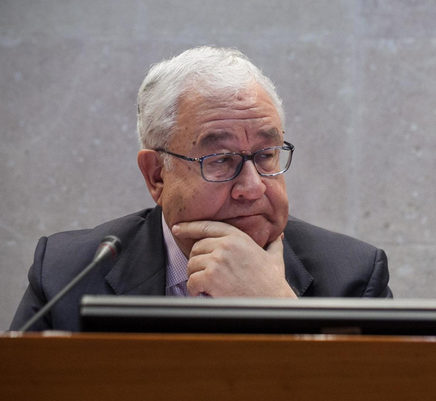 José Ángel Biel deja hoy su escaño en las Cortes tras una permanencia récord de 11.717 jornadas: llevaba 32 años y 26 días como diputado autonómico. Aragonesista converso, se pasó al PAR al acabar la legislatura en la que, desde la UCD, había ayudado a cercenar los anhelos autonomistas de la comunidad. Los seis diputados de su partido marcan un mínimo histórico mientras retumba su histórica referencia al “clavillo del abanico”